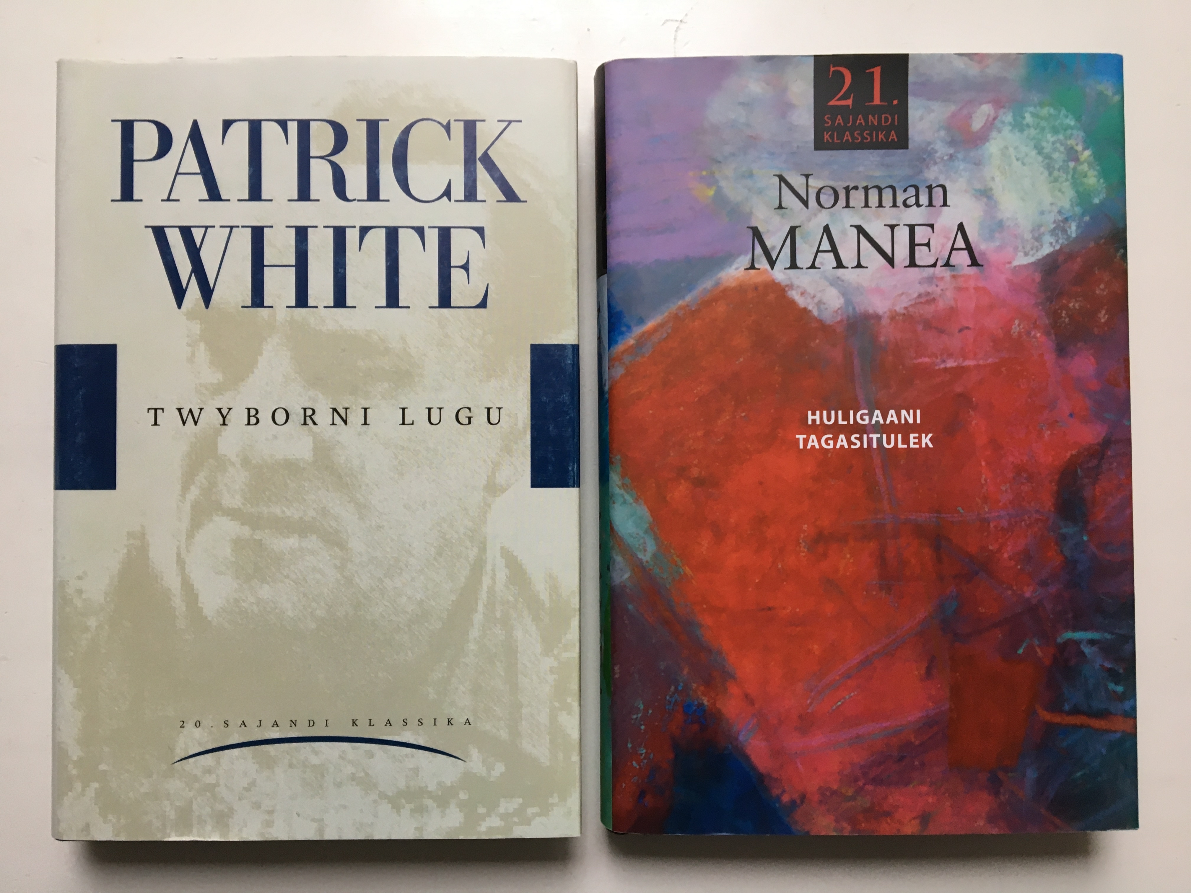 20. saj esikaaned